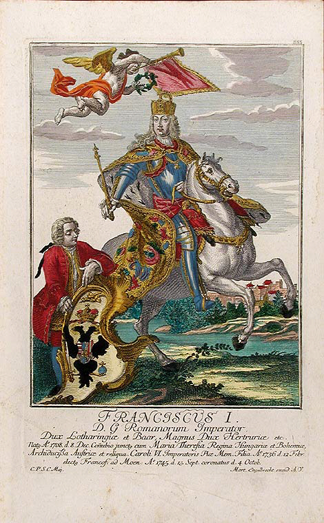 Kaiser Franz I. Stephan